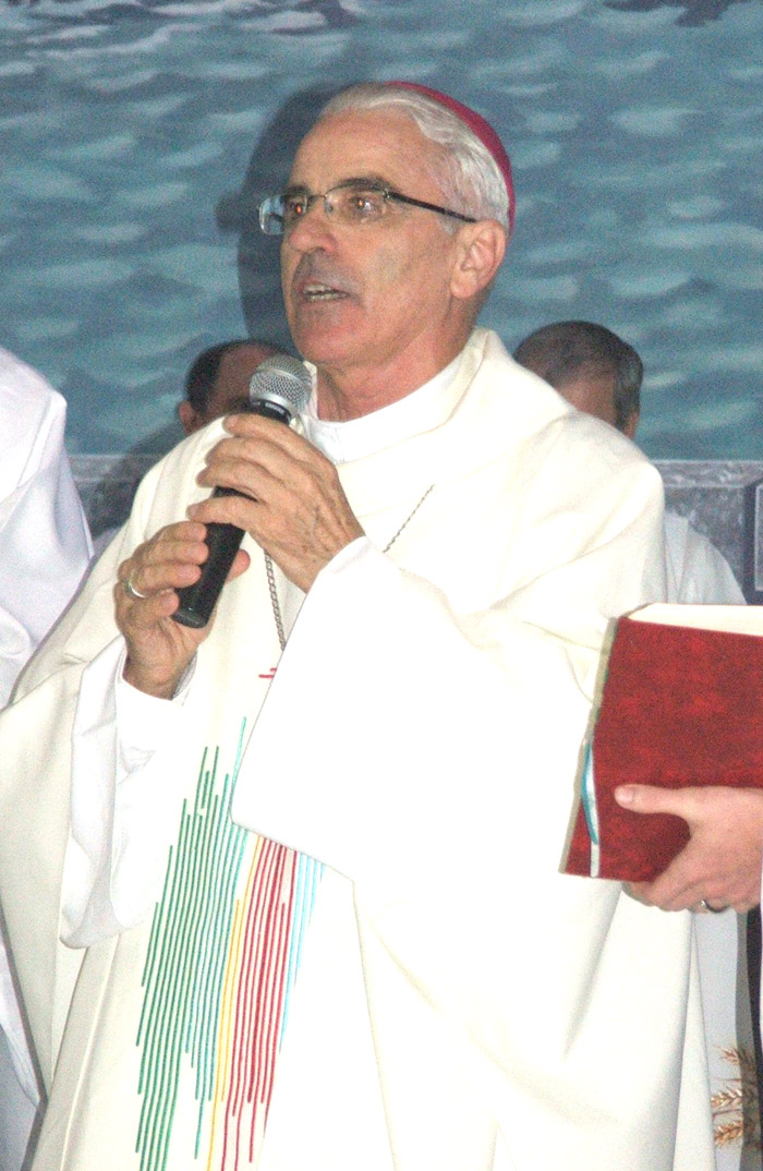 Dom Alessandro, no dia da consagração episcopal.